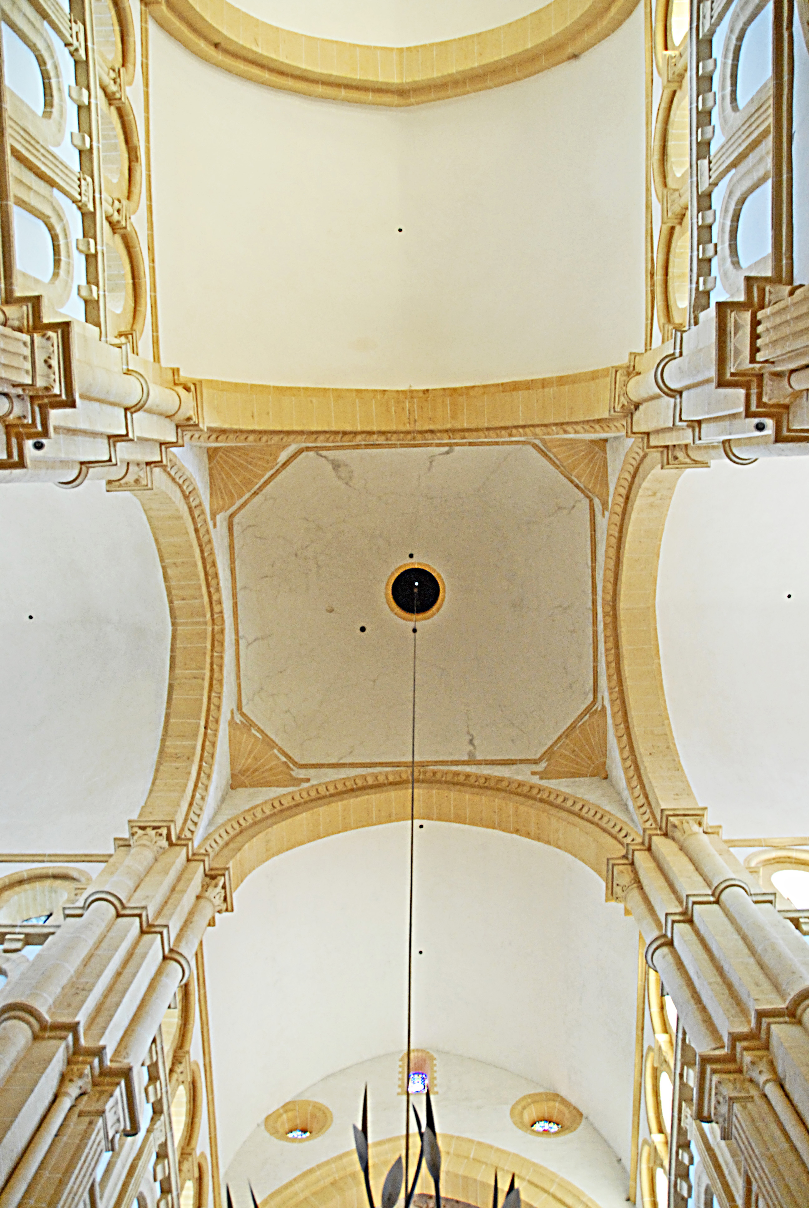 Vierungskuppel von unten